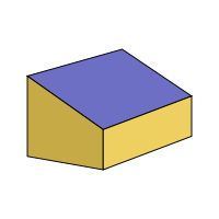 Česky: Pultová střecha - schéma